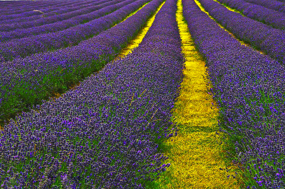 Lavender Field